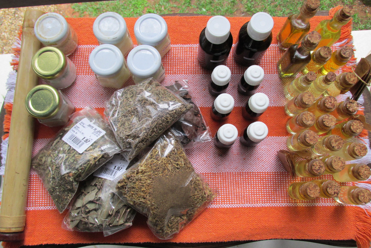 Mesa com preparados de ervas da oficina de Conexão com as Ervas durante a EncontrADA 2016. Mais informações